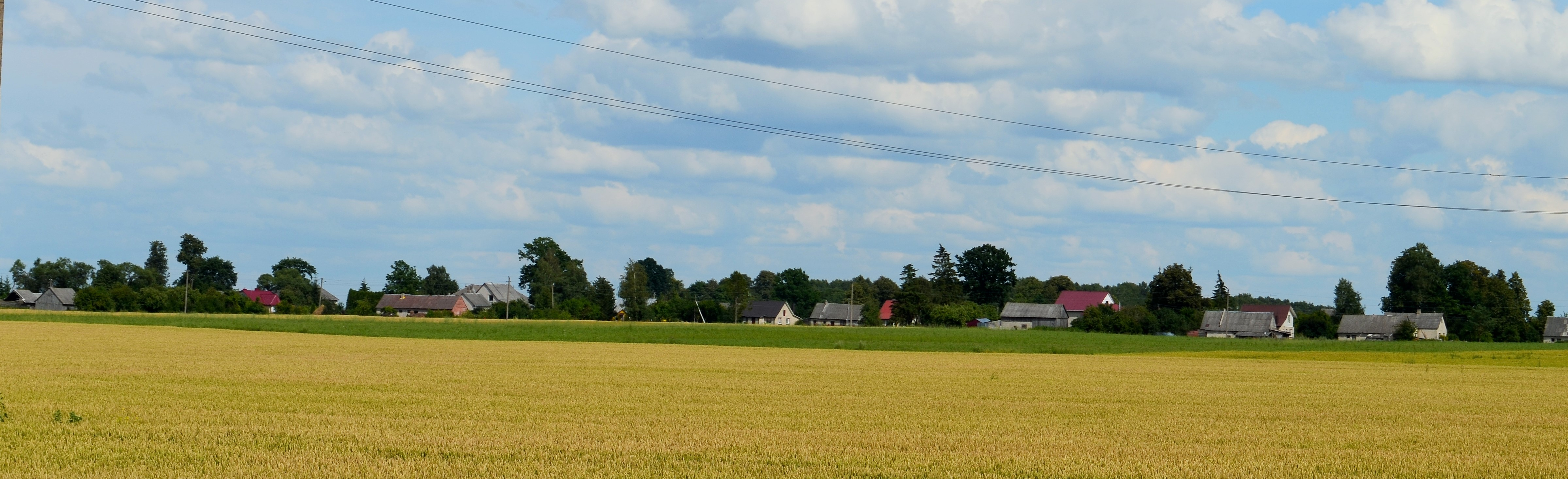 Mimainiai, Jonavos raj.